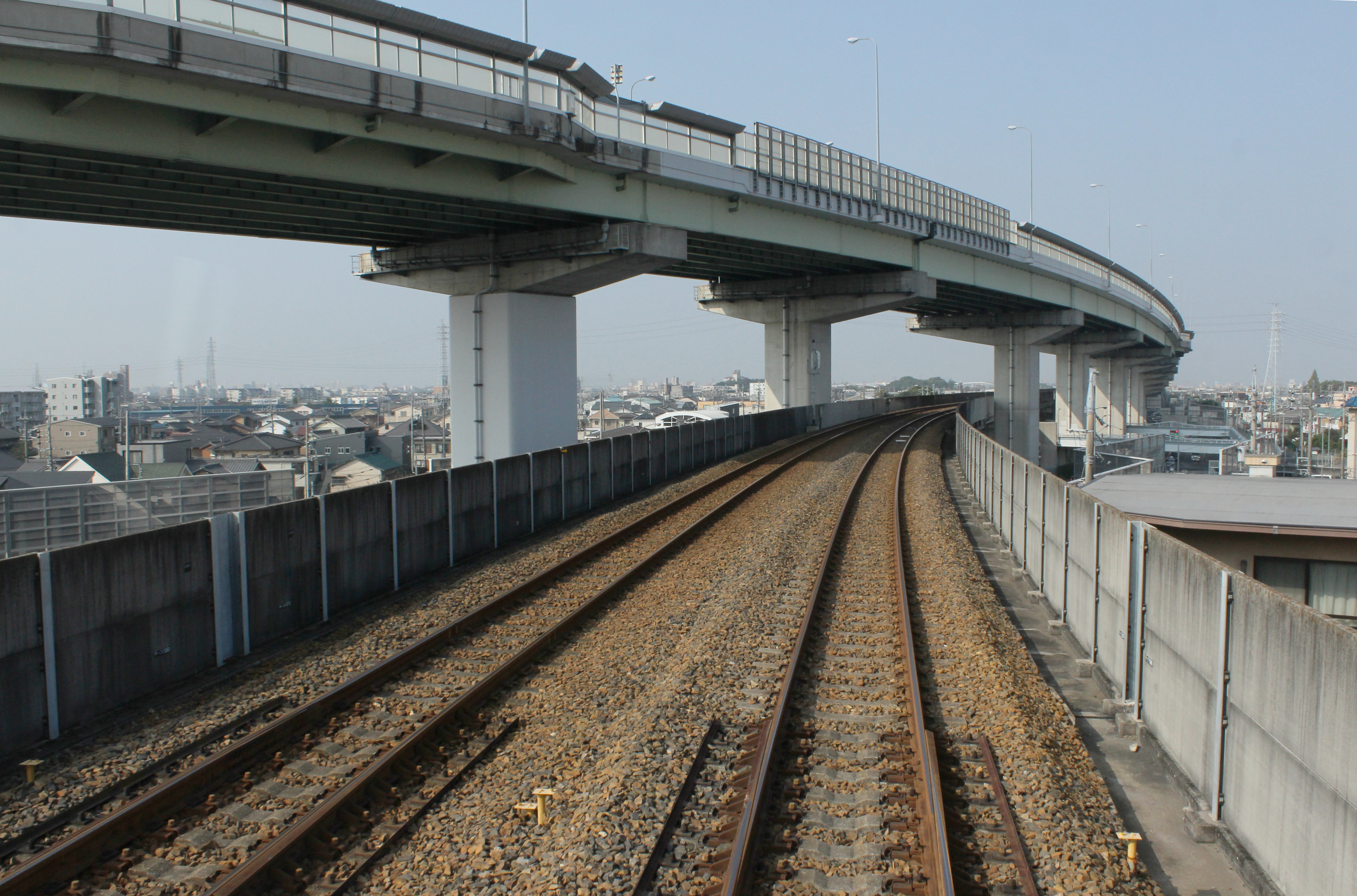 東海交通事業城北線と名古屋環状2号線のクロス部